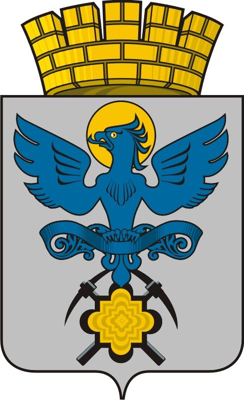 Герб городского округа Карпинск